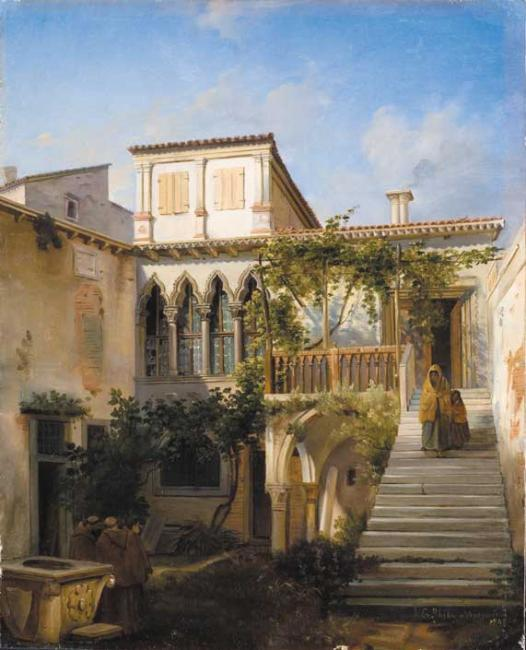 Кольцова-Мосальская Е. М. (Ghika).Венецианский двор, 1848